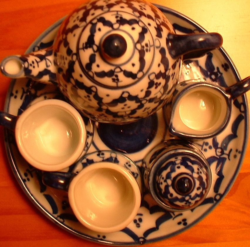 doll-sized tea set